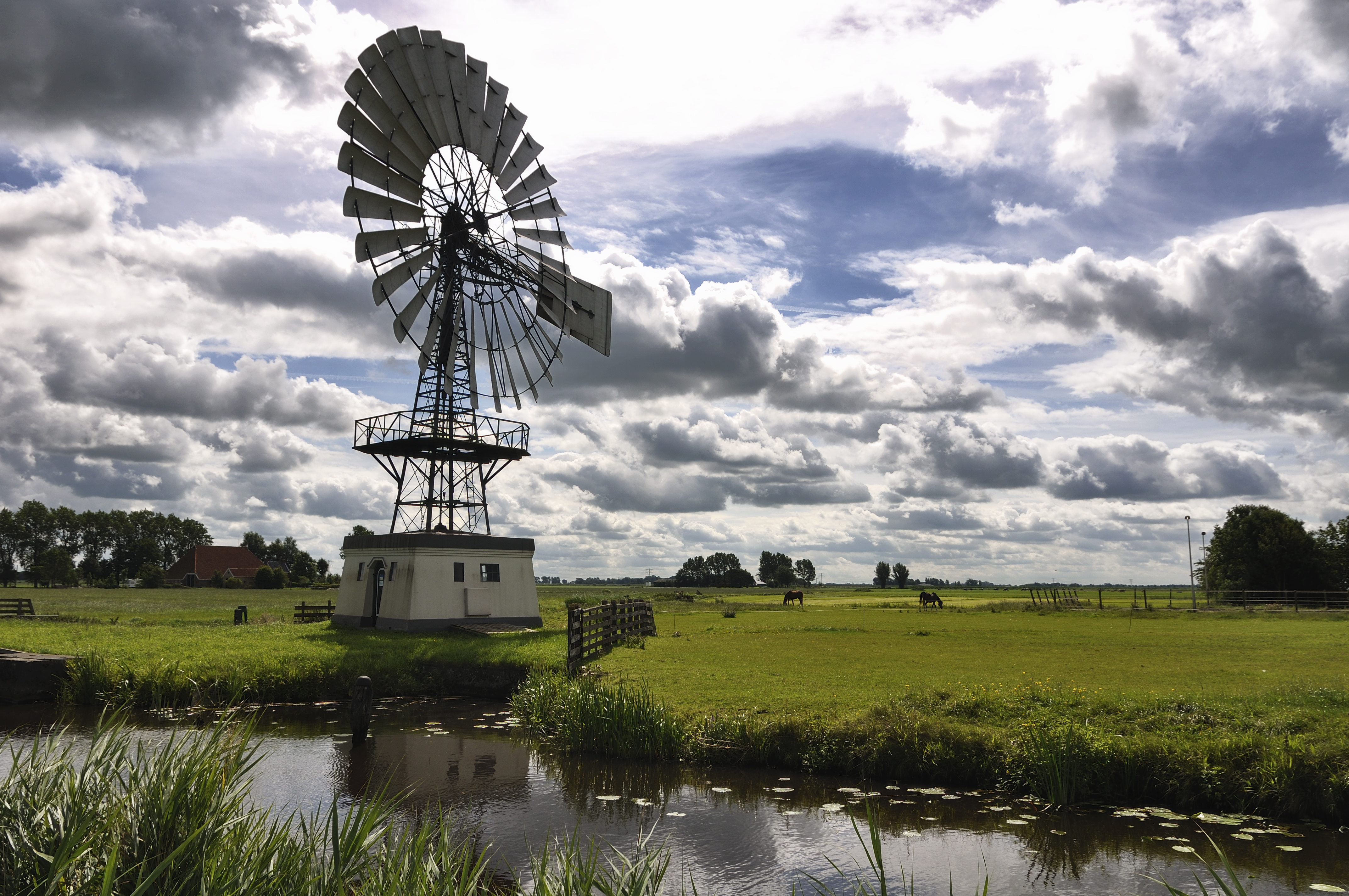 Dagje in friesland, deze Amerikaanse windmotor op de foto gezet.